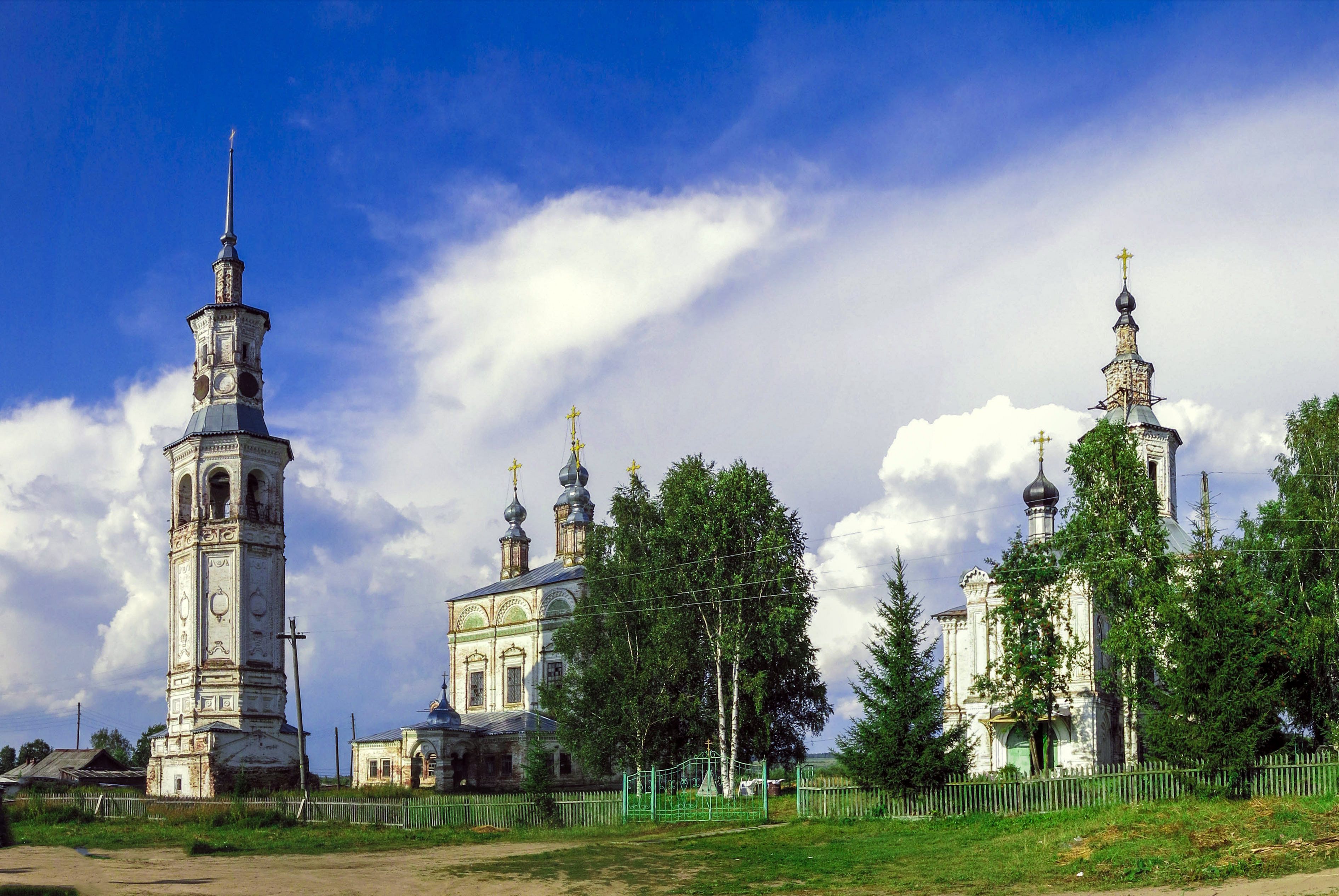 Ансамбль: площадь 25-го Октября, Лальск, Лузский район, Кировская область